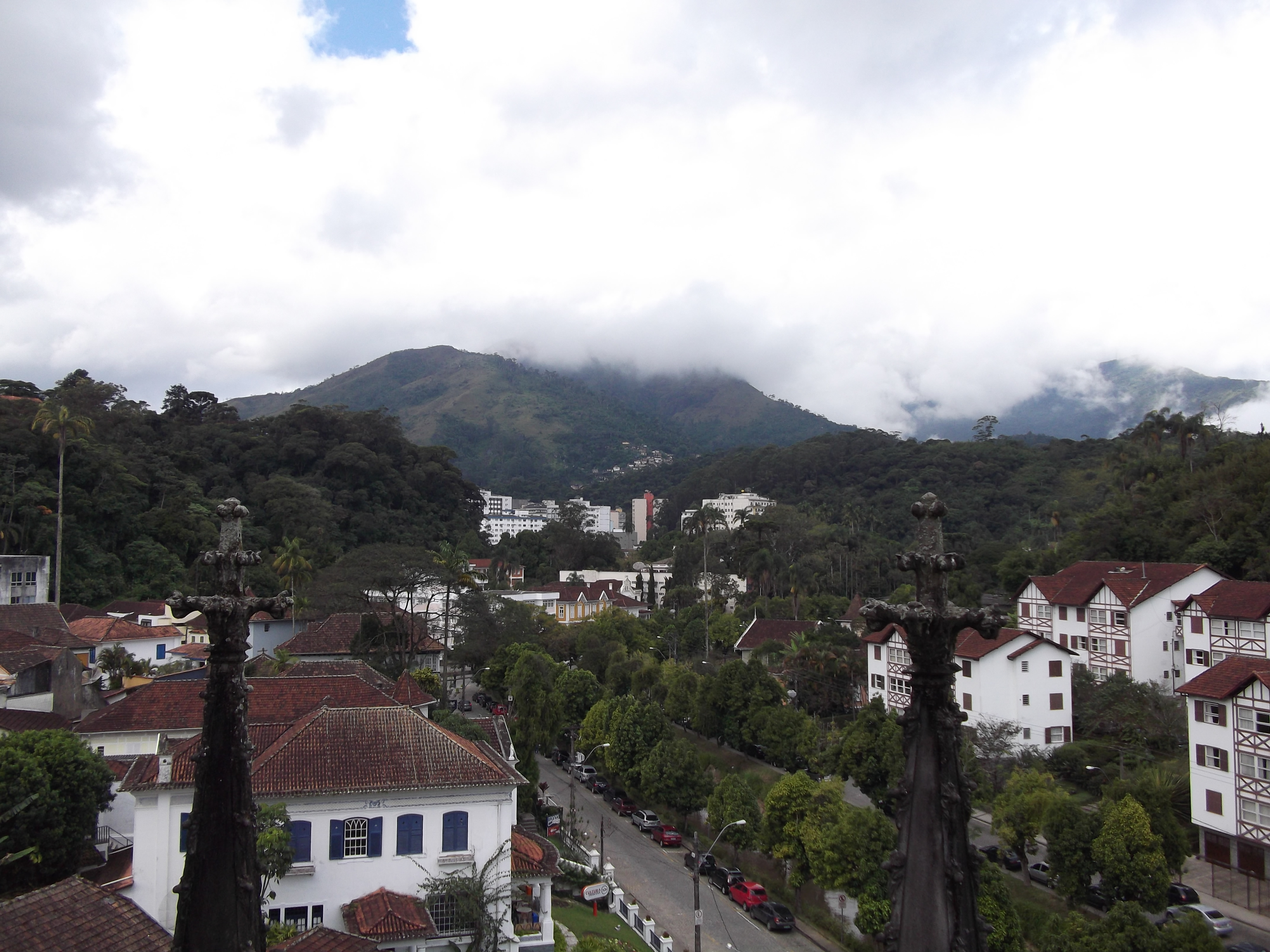 Vistas de Petrópolis (estado do Rio de Janeiro, Brasil) tiradas da Catedral